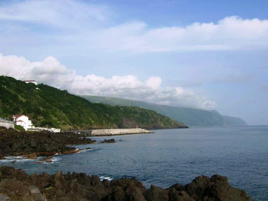 Falésias da Costa norte da ilha de São Jorge junto à Vila da Calheta, ilha de São Jorge, Açores, Portugal